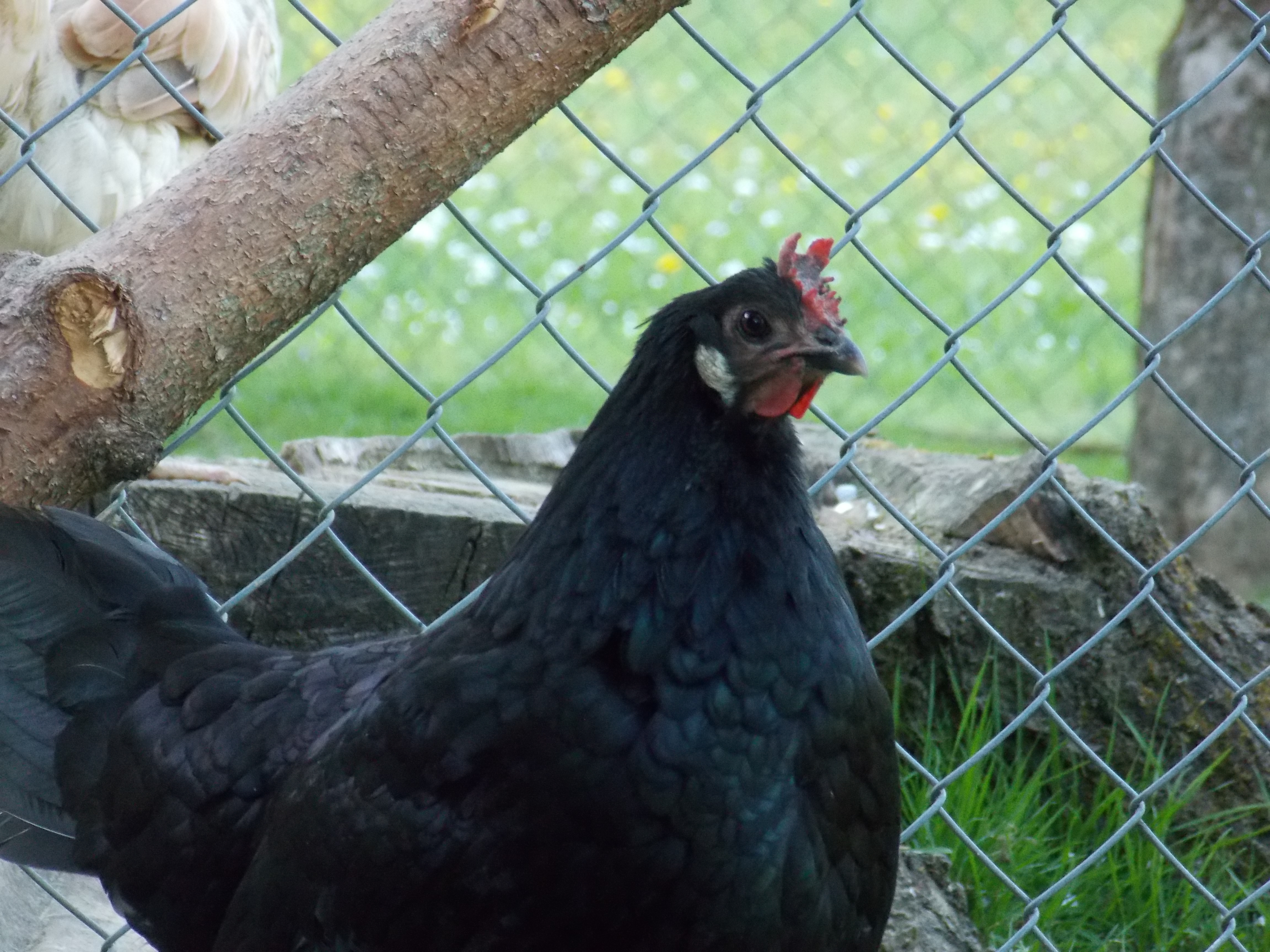 Schwarze Augsburger Henne mit dem Typischen Kronenkamm.